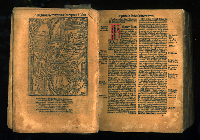 Un des deux incunables de la bibliothèque historique de Rolle